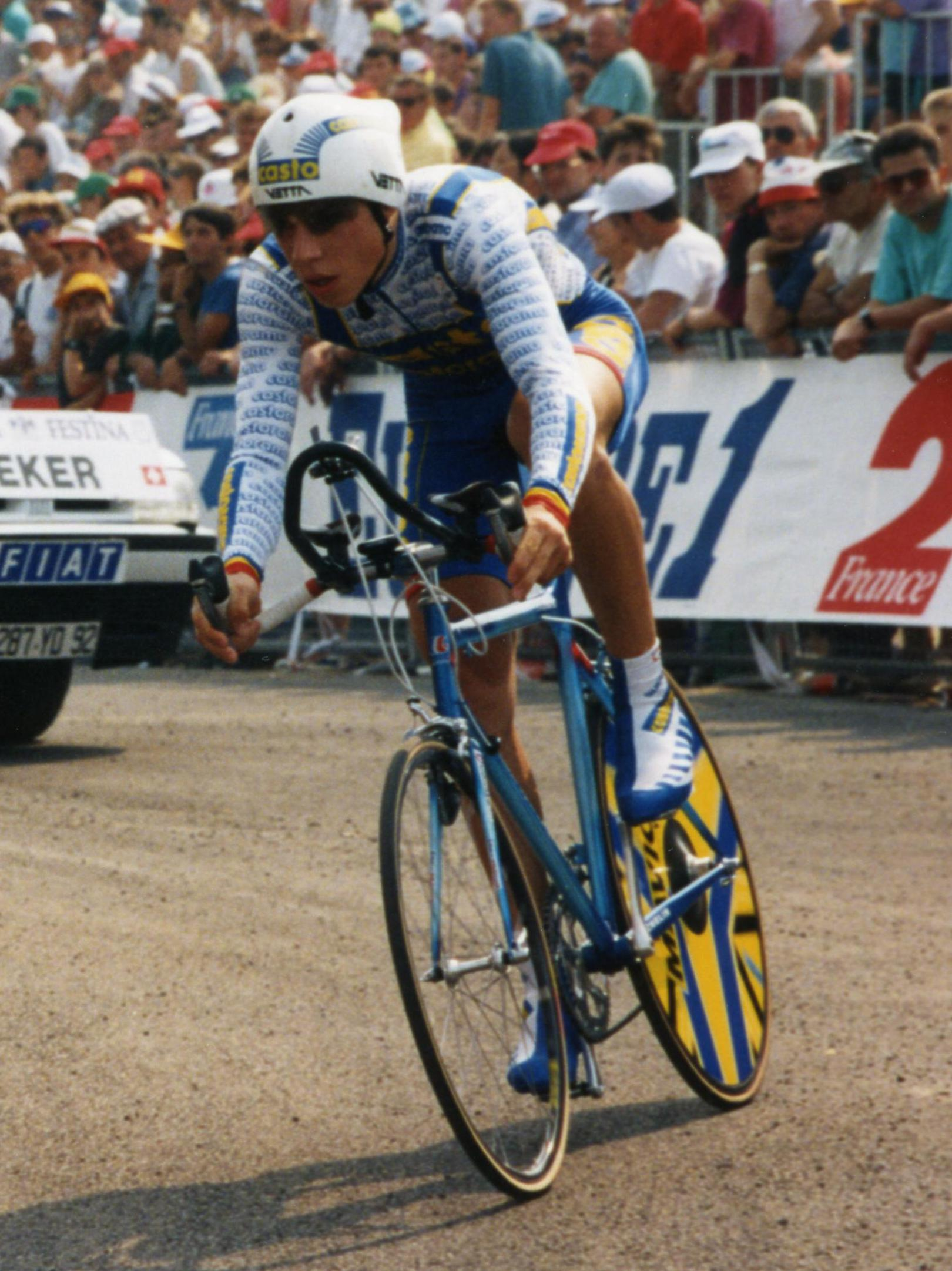 TOUR DE FRANCE 1993